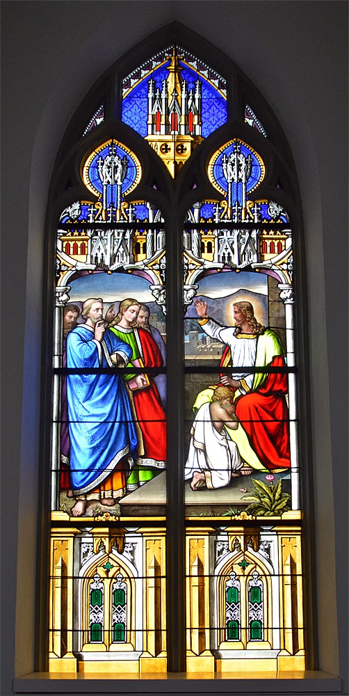 Glasfenster von Johann Jakob Roettinger in der reformierten Kirche in Baar, Kanton Zug, Schweiz